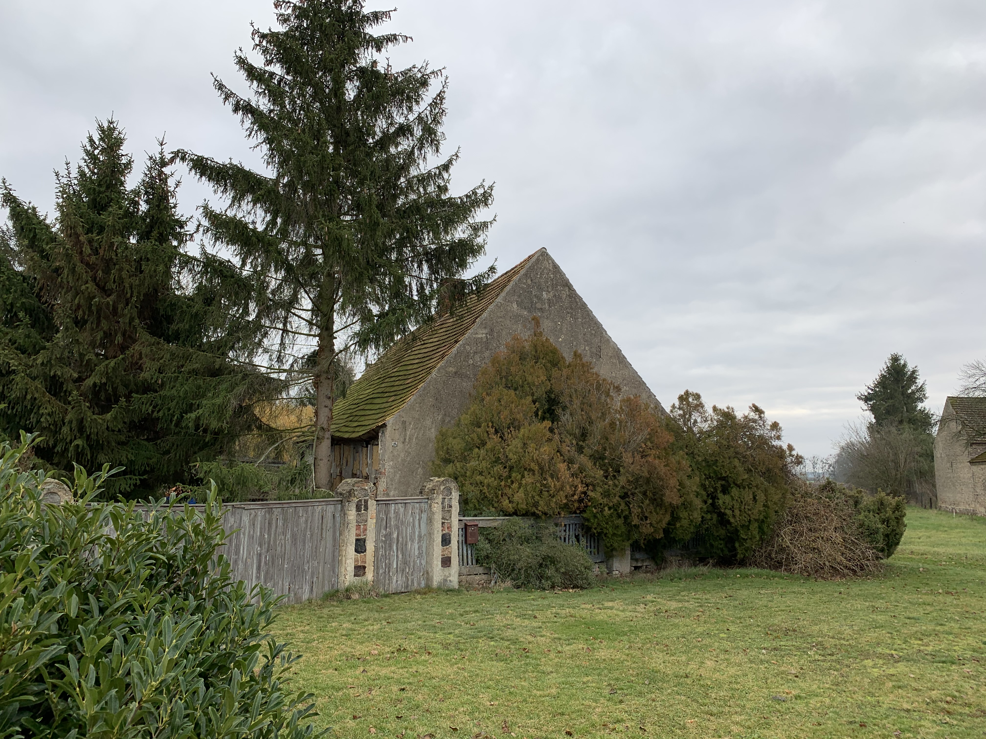 Radeland, ein Ortsteil von Baruth/Mark in Brandenburg